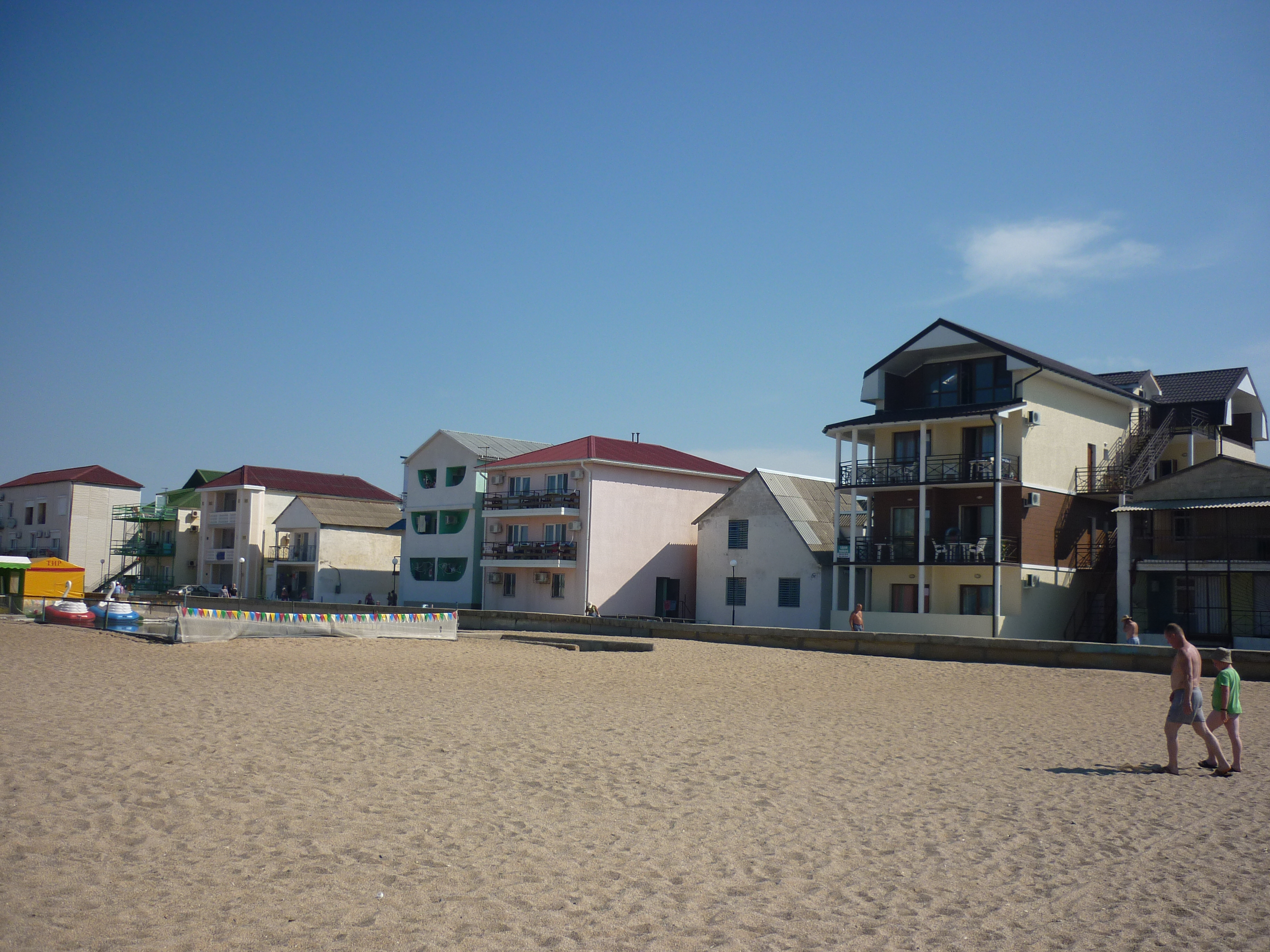 База відпочинку "Прибой" у місті Саки АР Крим